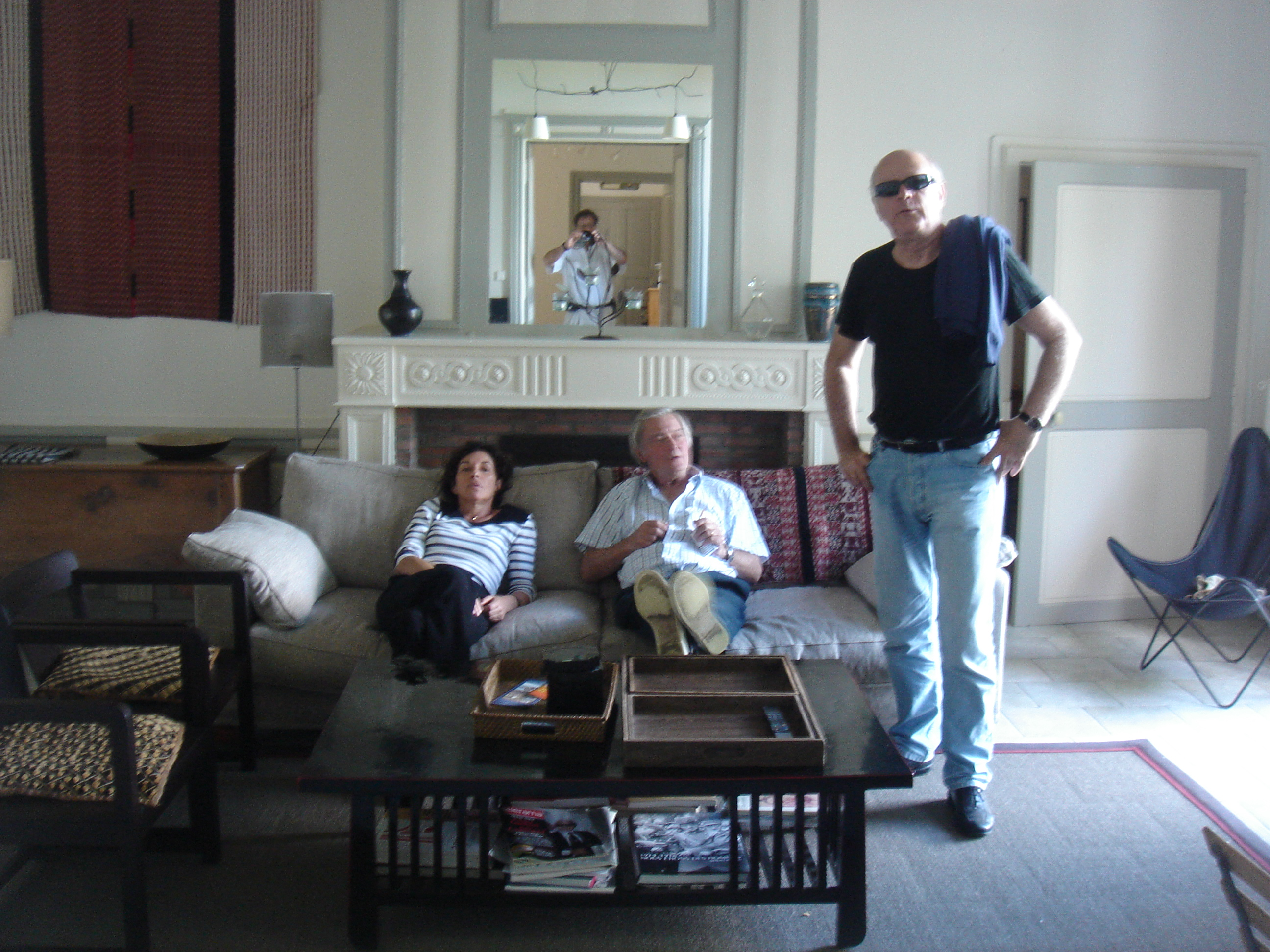 août 2015 - dans le canapé : la productrice annie volson et le scénariste pierre uytterheven ; debout : le scénariste philippe madral ; dans le miroir : le réalisateur Patrick Volson.